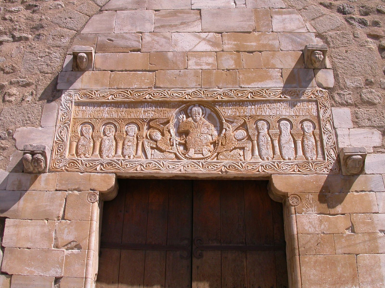 Llinda 1019-1020